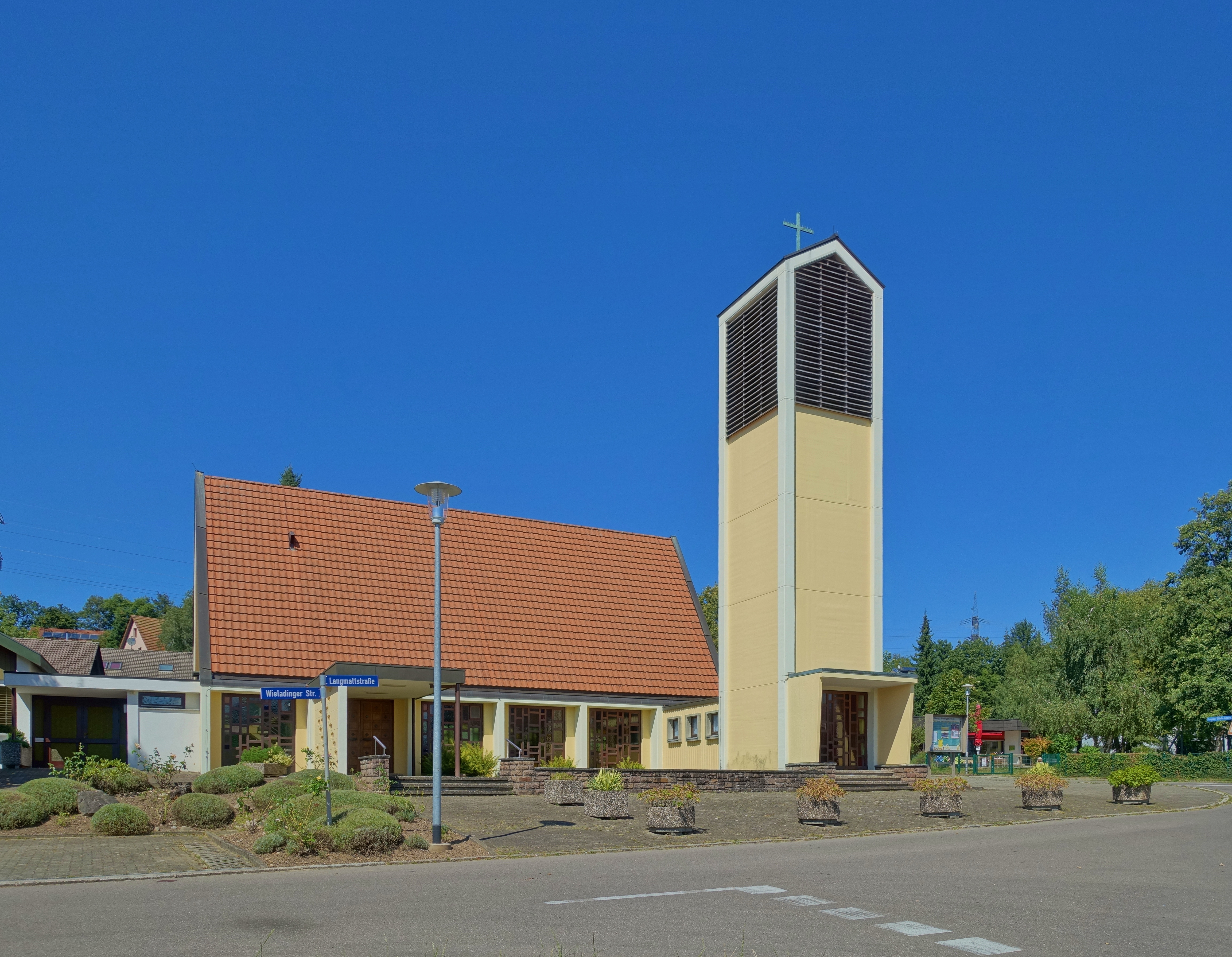 evang. Christuskirche